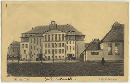 Postkarte der Ostschule in Düren, NRW, aus dem Jahr 1915